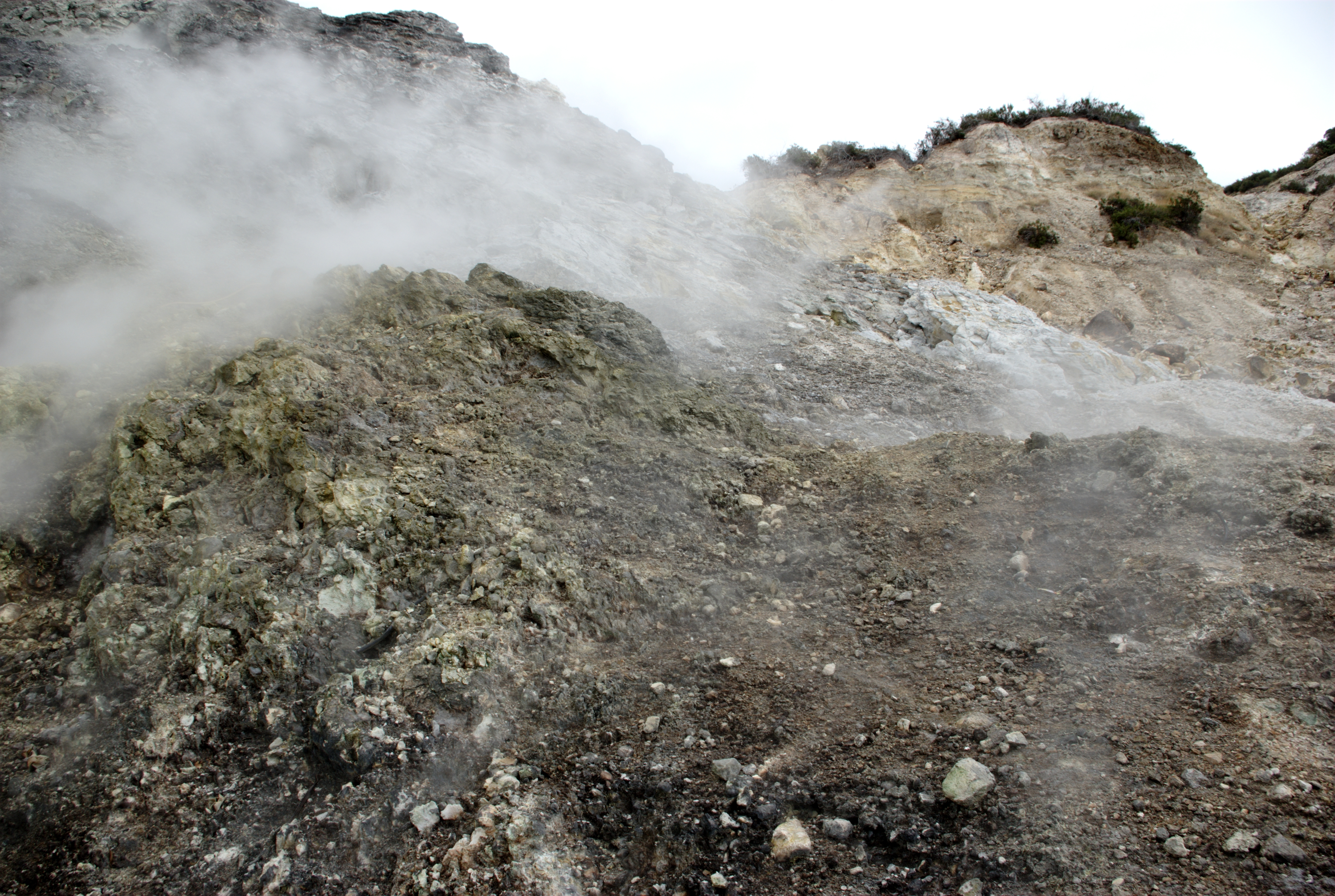 Fumarole della Solfatara di Pozzuoli Autore foto: Roberto De Martino